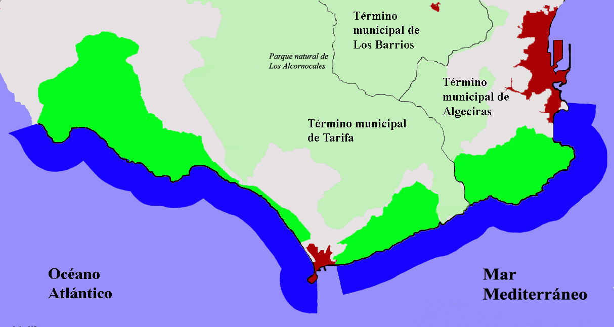 Mapa del Parque Natural del Estrecho de Gibraltar. Imagen realizada para Wikimedia.